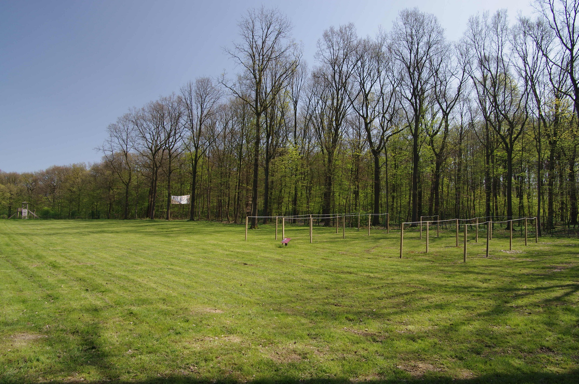 Bodendenkmal Römerberg in Bergkamen-Oberaden, Nordrhein-Westfalen, Deutschland Bereich Nordtor